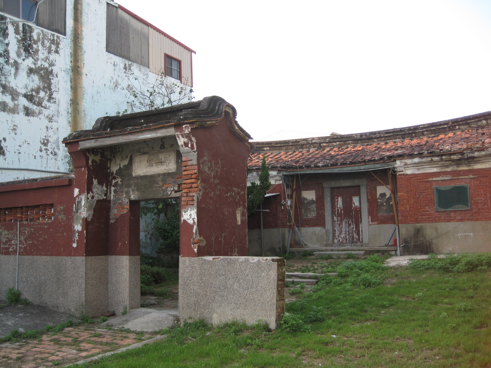 中文（台灣）: 2011年11月的安平盧經堂厝